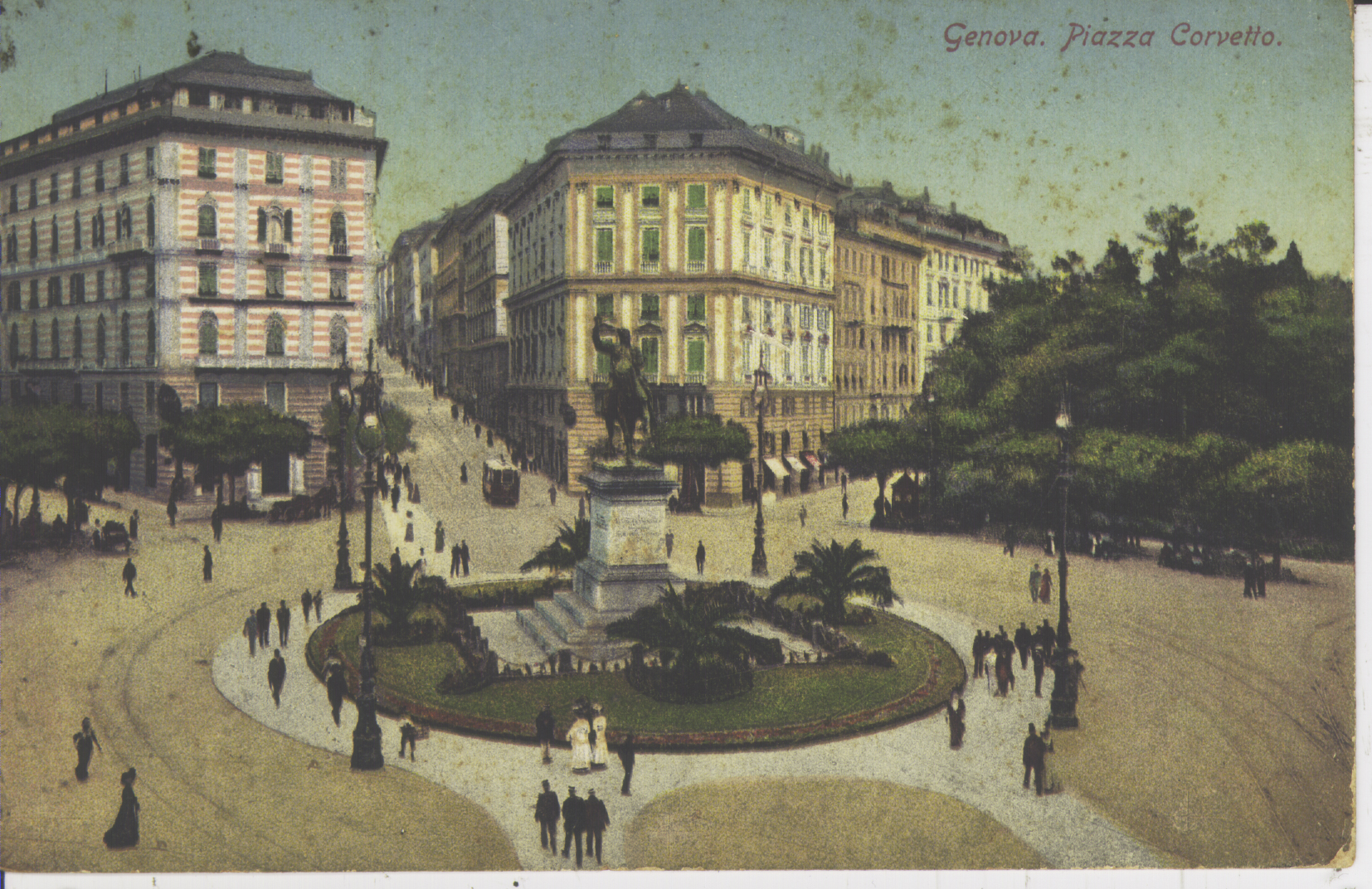 Obra que integra o acervo do Museu Paulista da USP. Coleção João Baptista de Campos Aguirra.